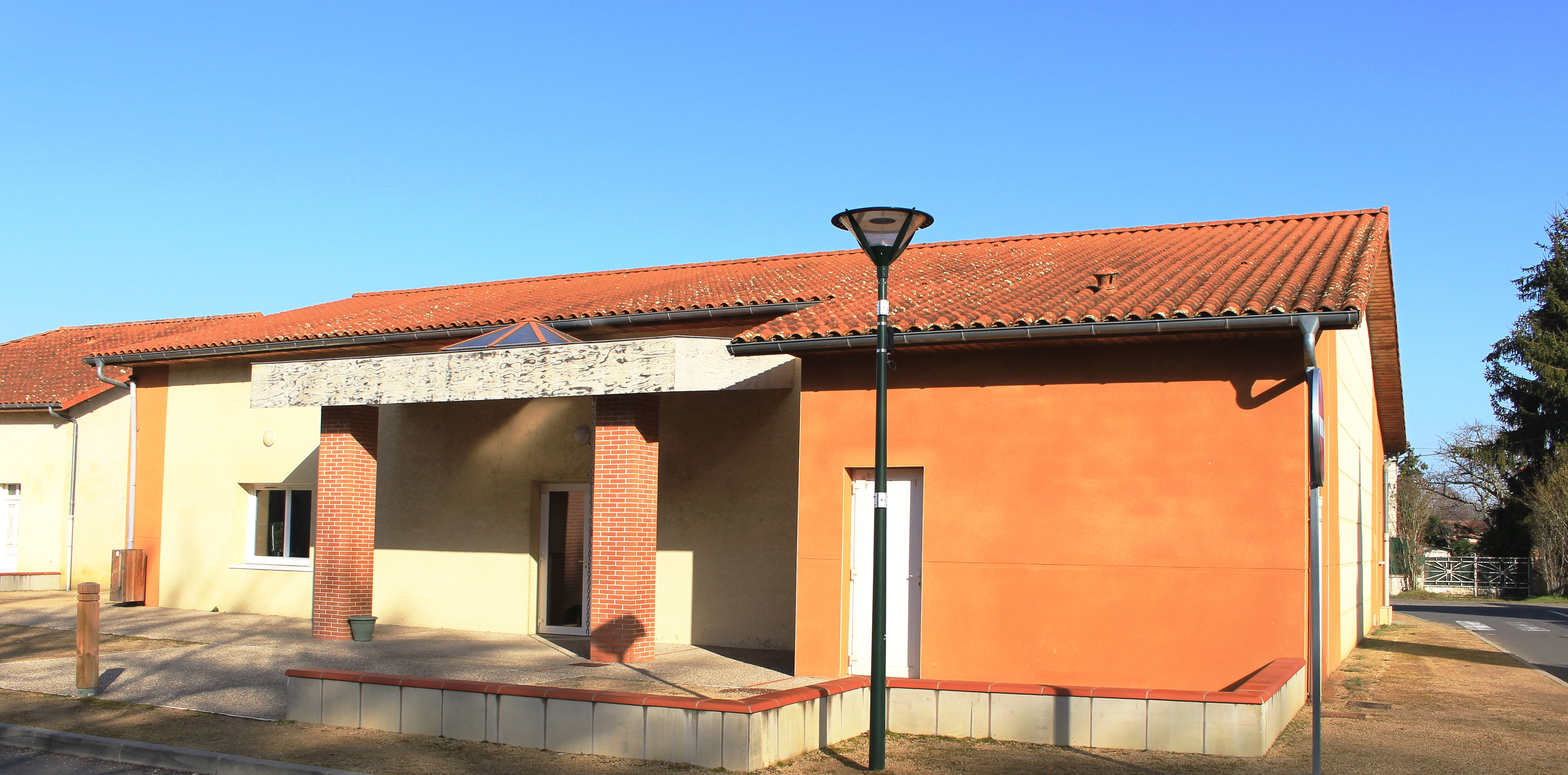 Salle des fêtes de Chelle-Debat (Hautes-Pyrénées)